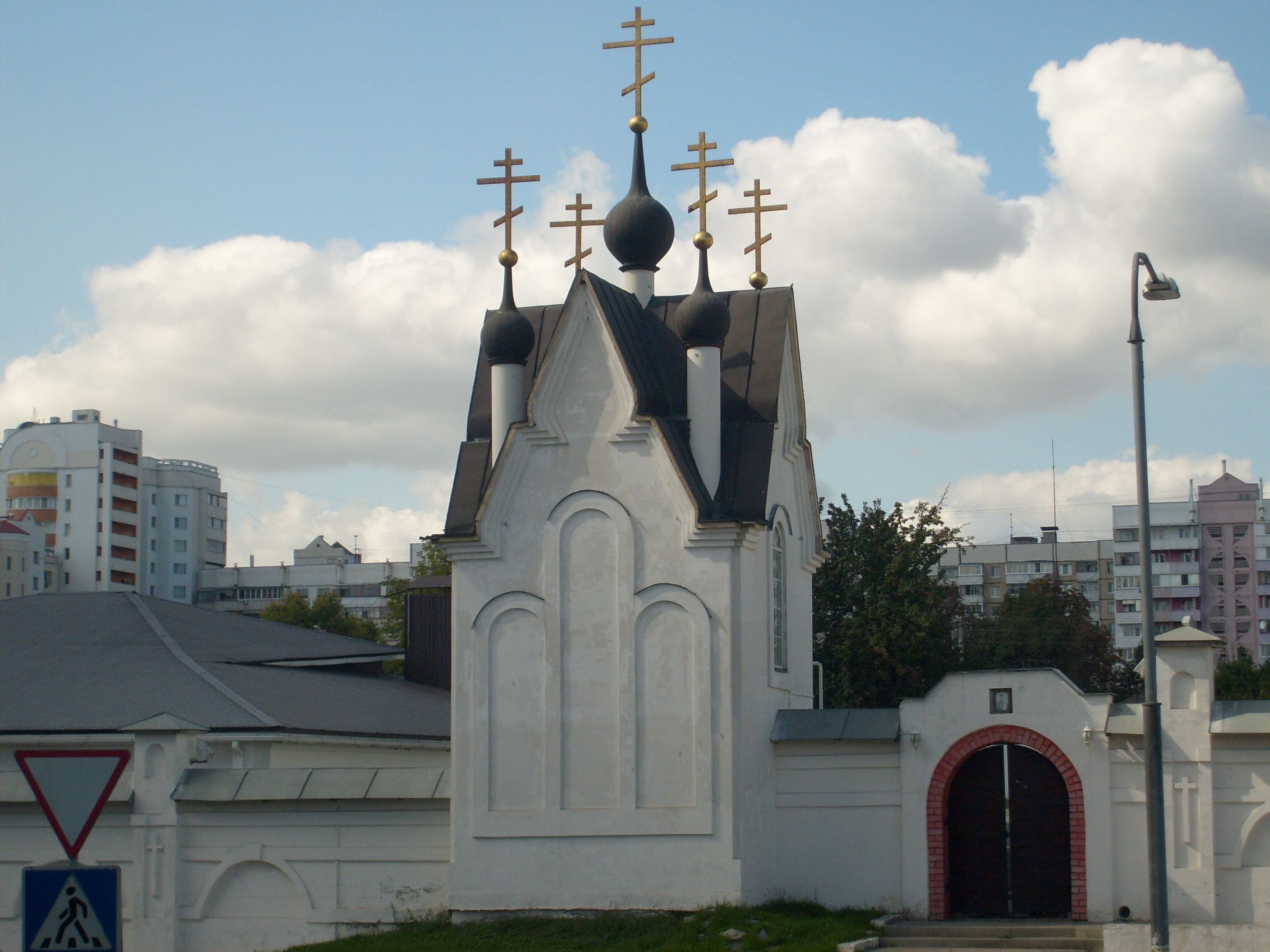 Небольшая кубическая часовня, завершенная декоративным пятиглавием. Сооружена в 1999. г. Белгород, ул. Пушкина, 19